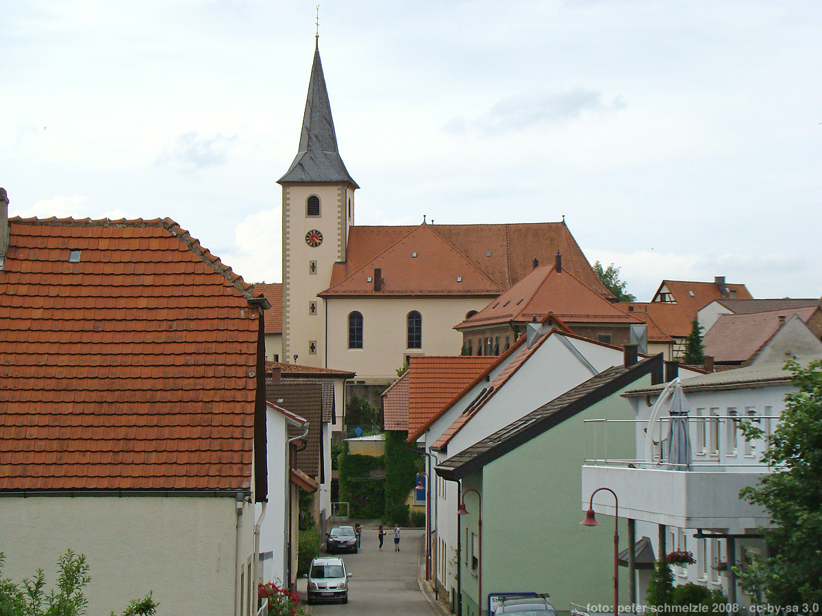 Blick zur kath. Martinskirche in Kraichtal-Landshausen